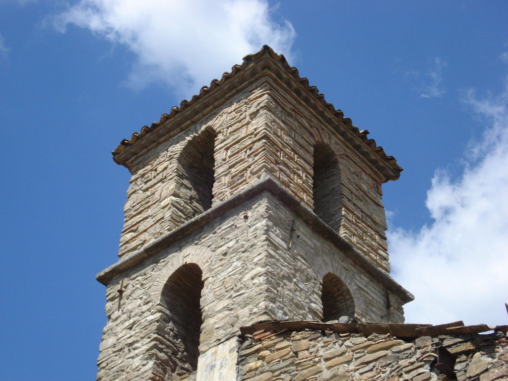 Cappella di Santa Domenica nell'antico Rione Costa